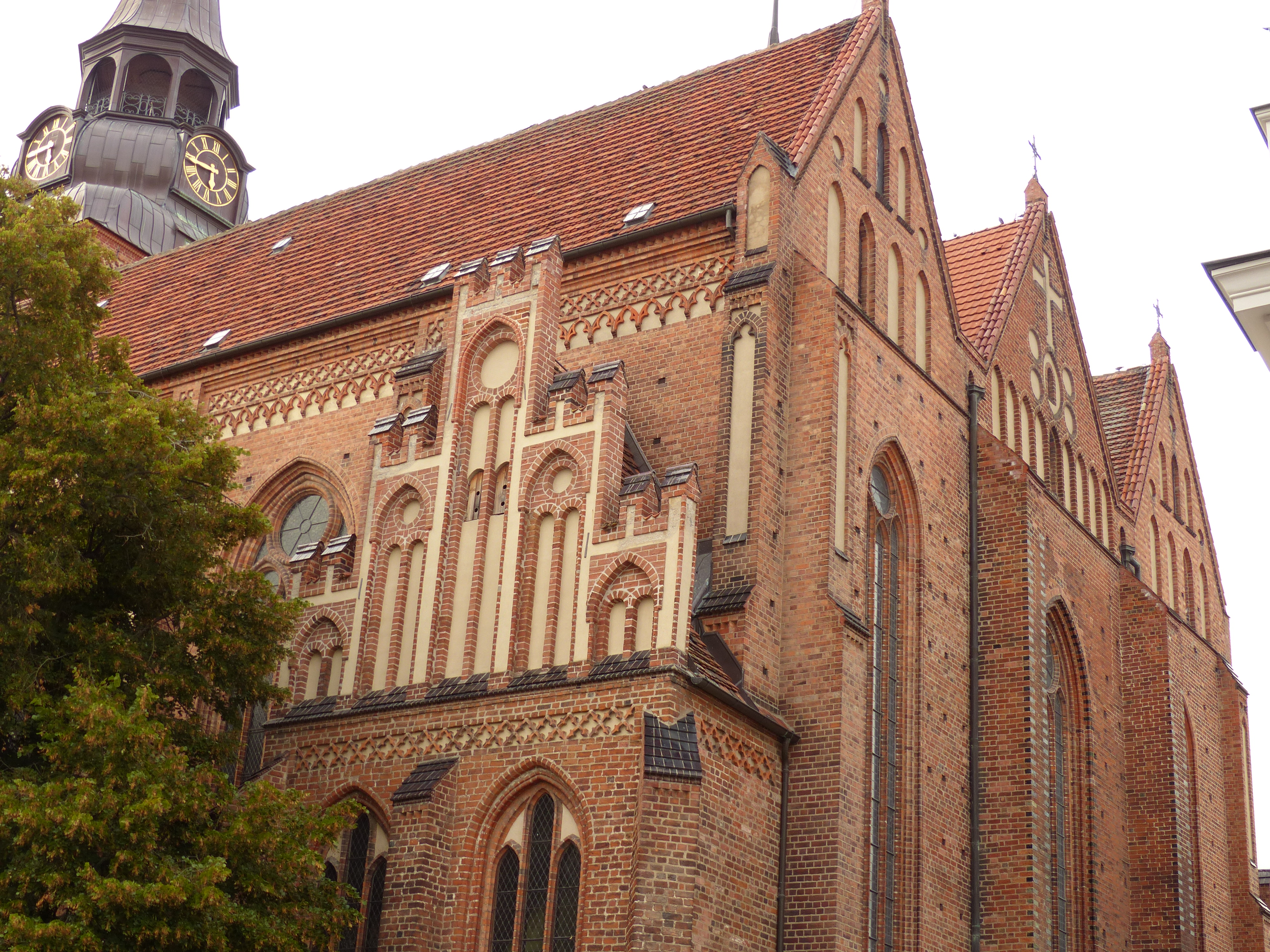 Ostgiebel der Marienkirche in Güstrow von Südosten. Die heute dreischiffige gotische Hallenkirche war vom frühen 16. bis ins späte 19. Jahrhundert fünfschiffig. Sie hat drei parallele Längsdächer. In Deutschland ist das eine Seltenheit, in Flandern und den Niederlanden die häufigste Dachform für Hallenkirchen. Auch die großen Danziger Kirchen, einschließlich der Marienkirche, haben parallele Längsdächer.